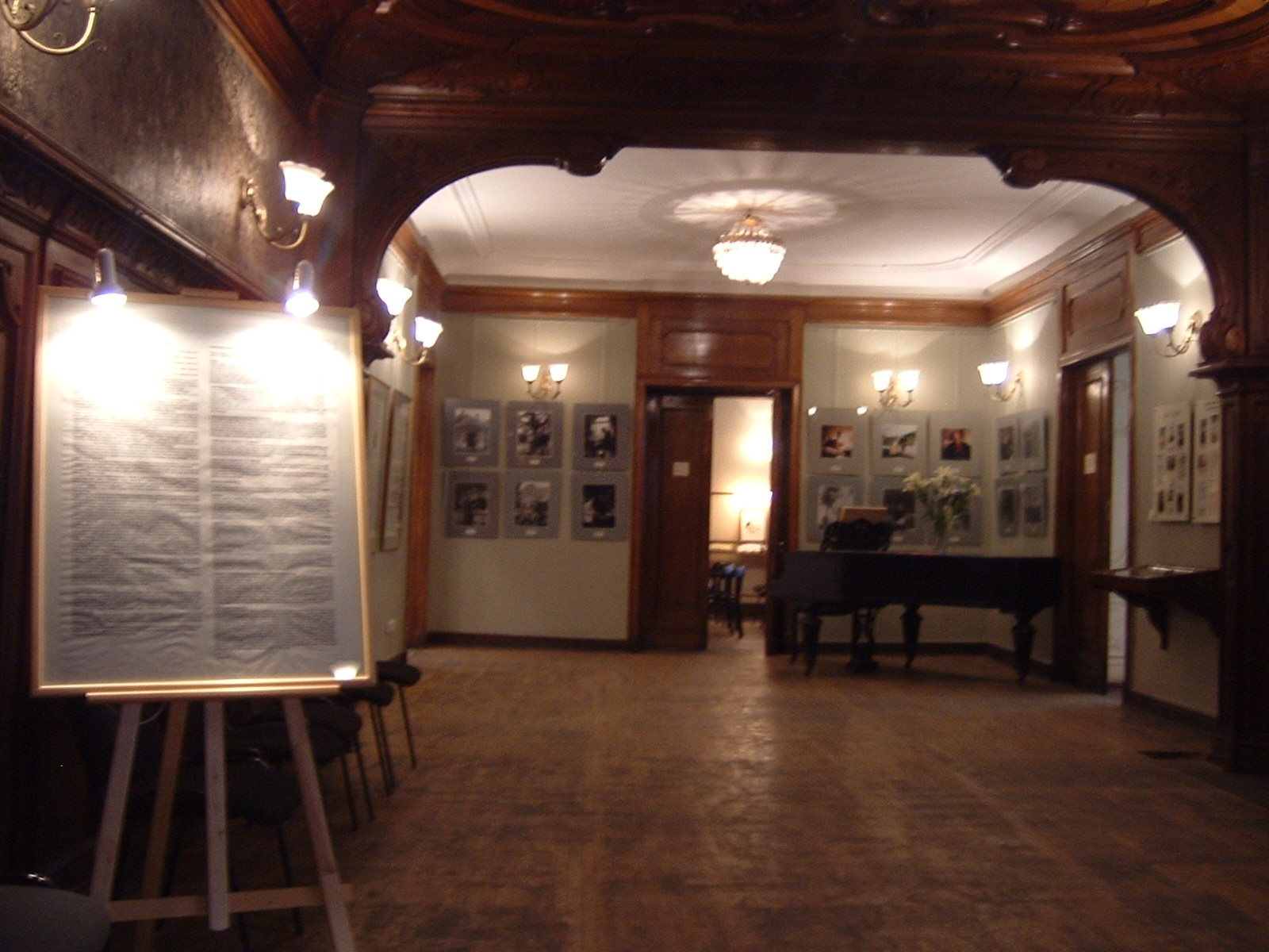 Nabokov House inside